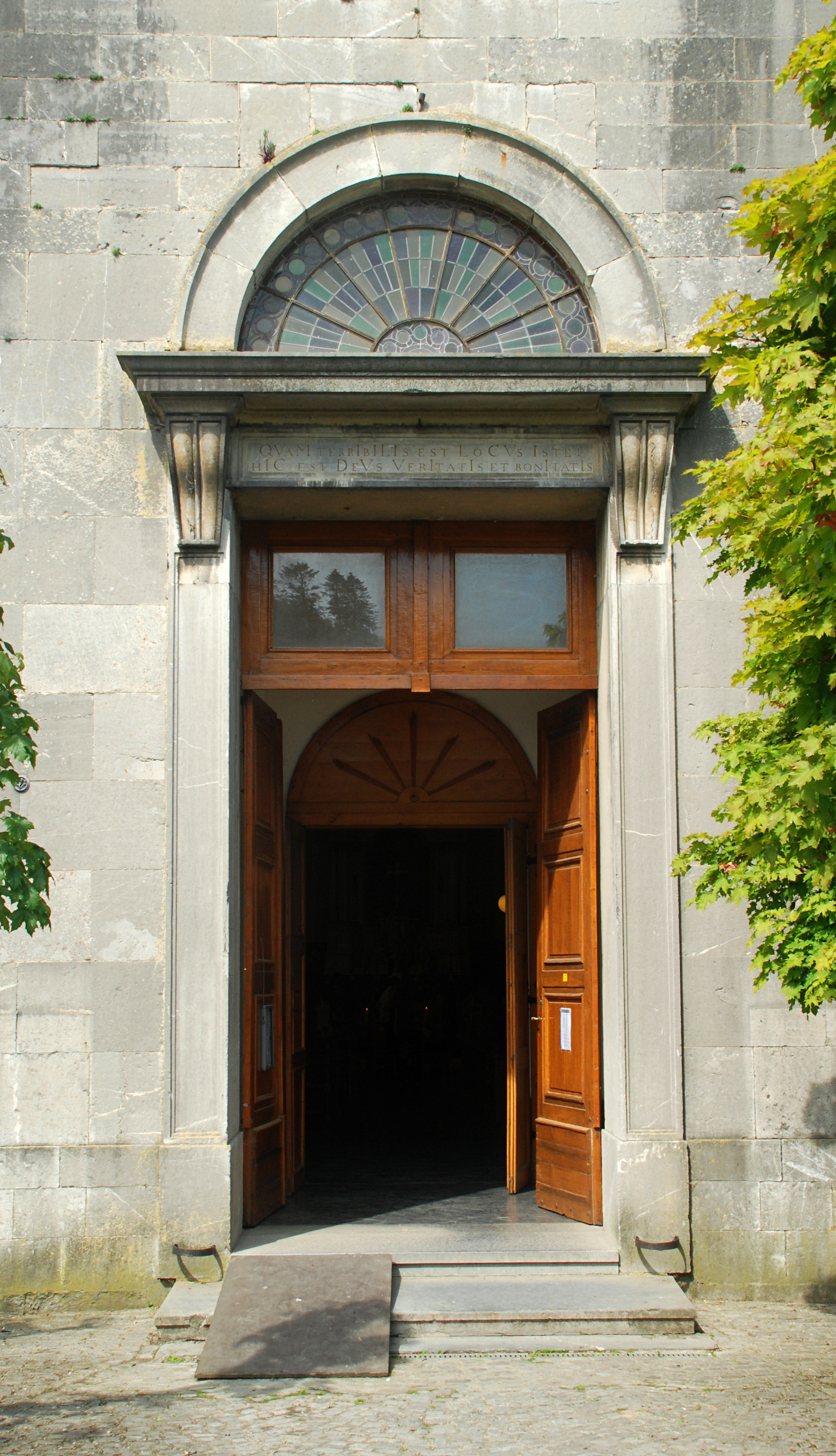 Belgique - Province de Namur - Viroinval - Nismes - église Saint-Lambert (1829